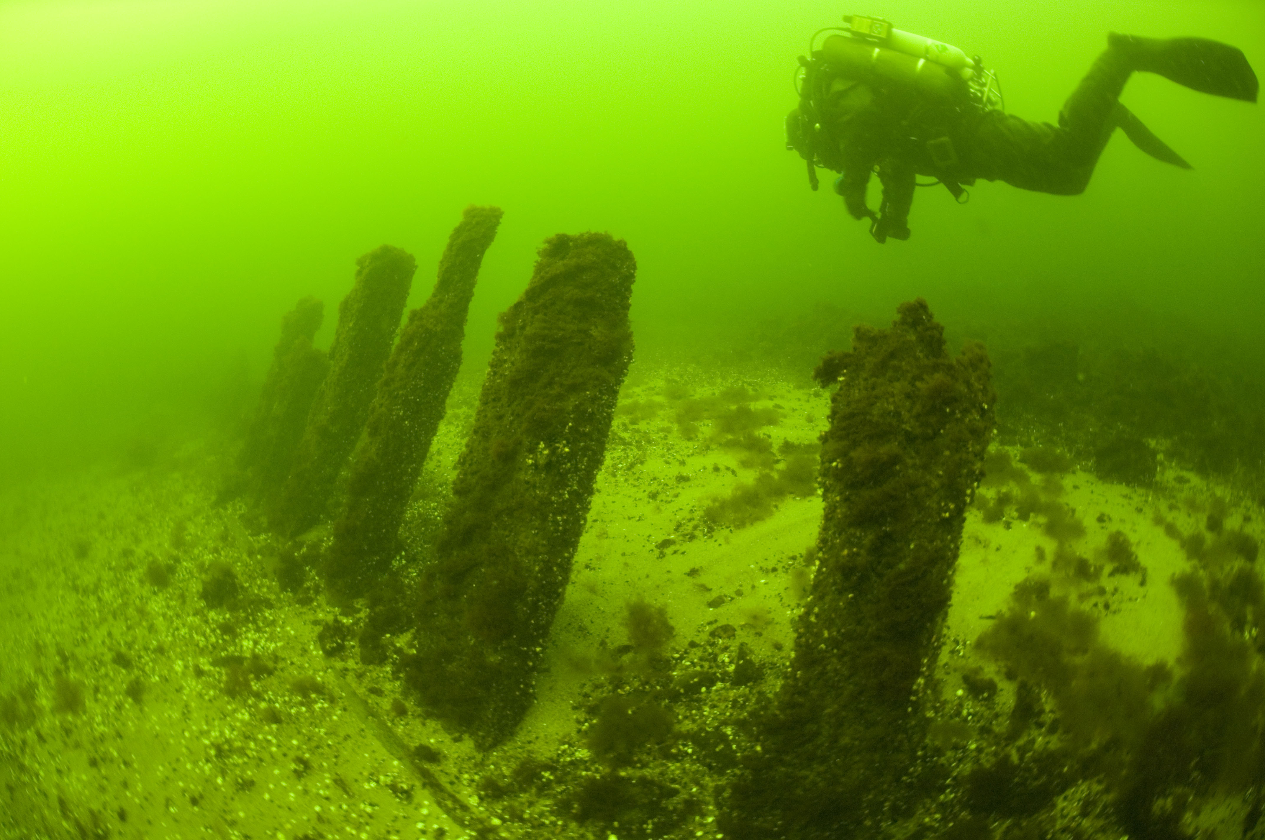 Laevavrakk, nn Littegrundi vrakk. Vraki küljeosa.